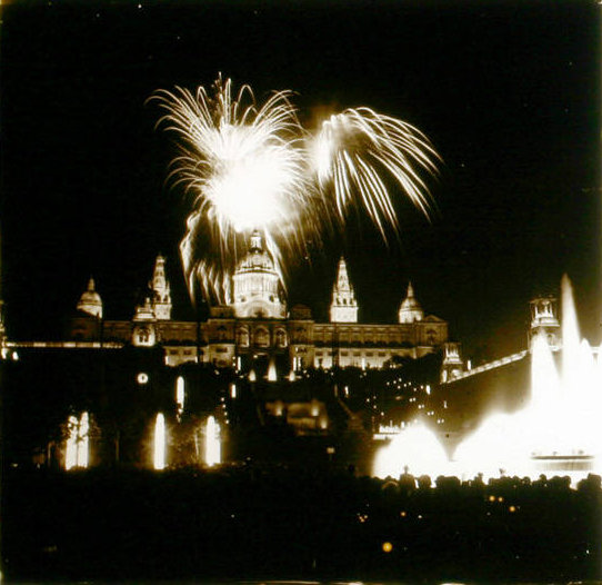 Fotografia de focs d'artifici al recinte de Montjuïc durant els actes de l'Exposició Universal de Barcelona de 1929, feta per Marcel·lí Gausachs.